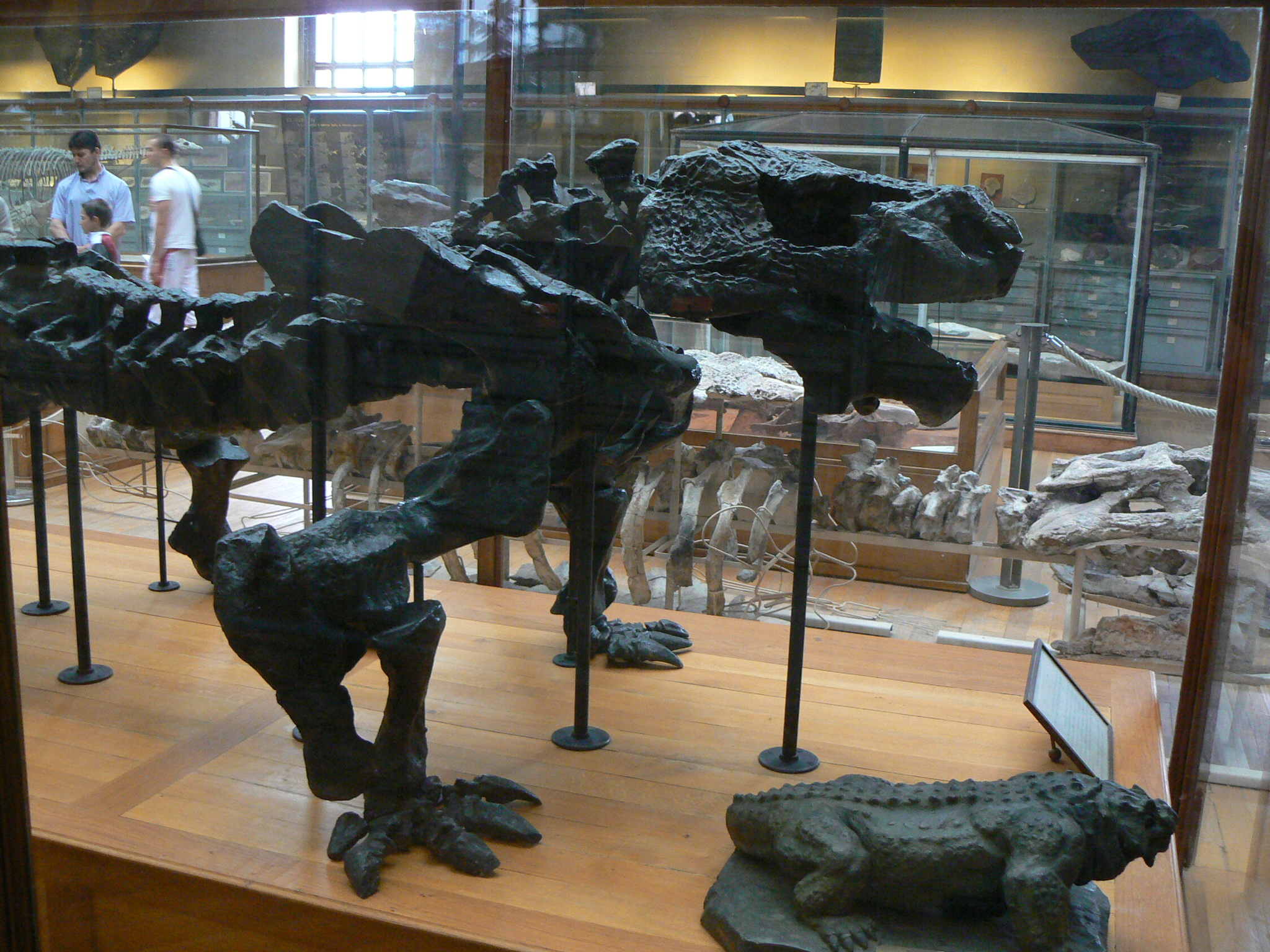 Bradysaurus (Pareiasaurus) baini